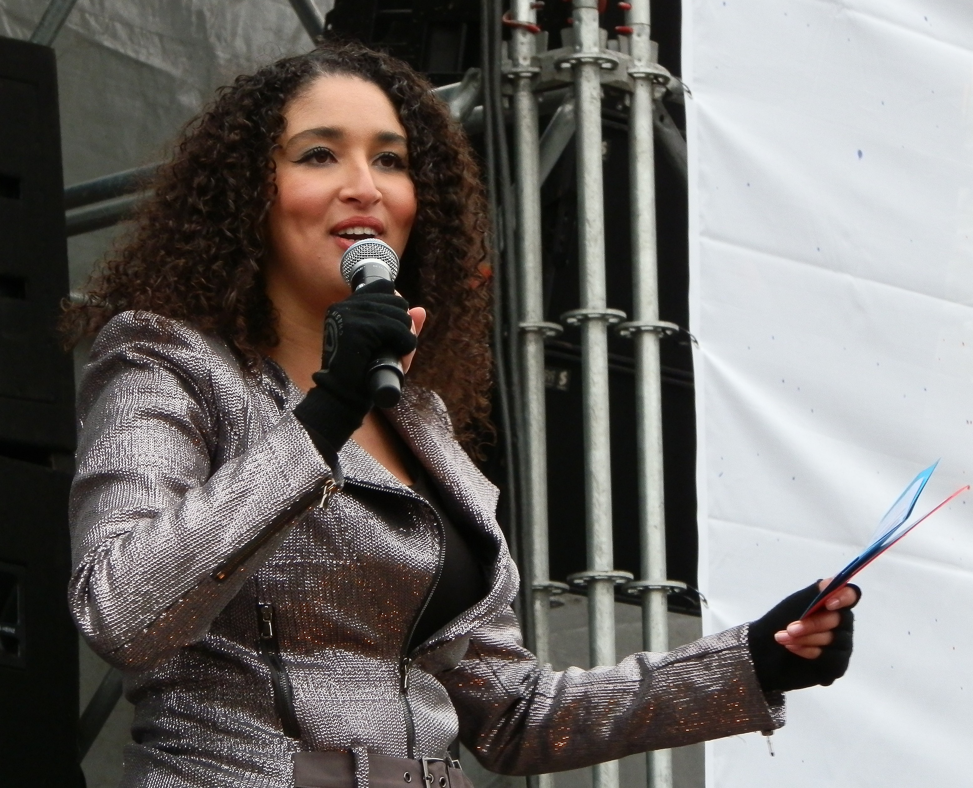 Soundos El Ahmadi presenteert het bevrijdingsfestival in Utrecht op 5 mei 2012